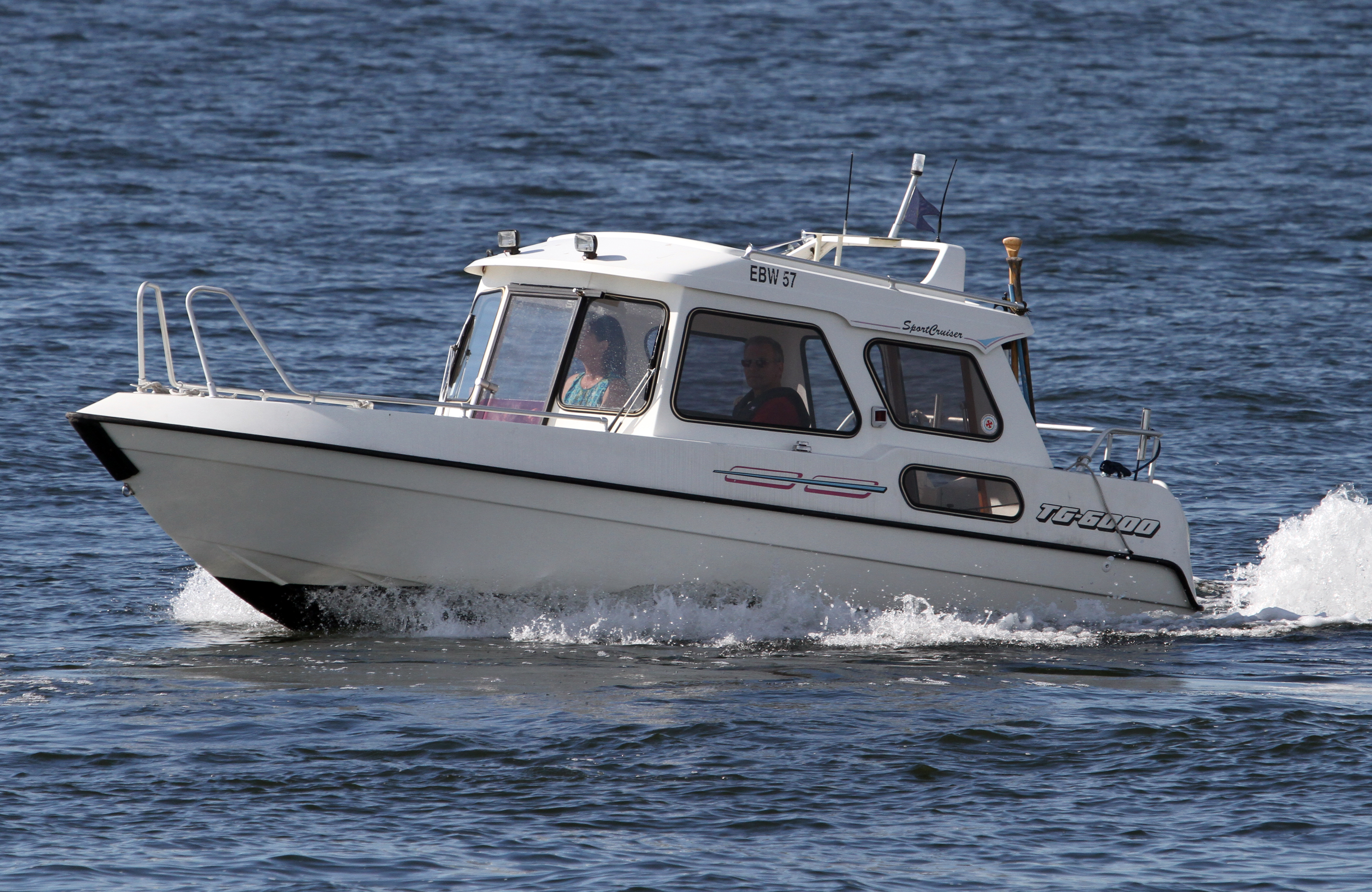 TG 6000 Sport Cruiser i Tenösund 4 augusti 2015